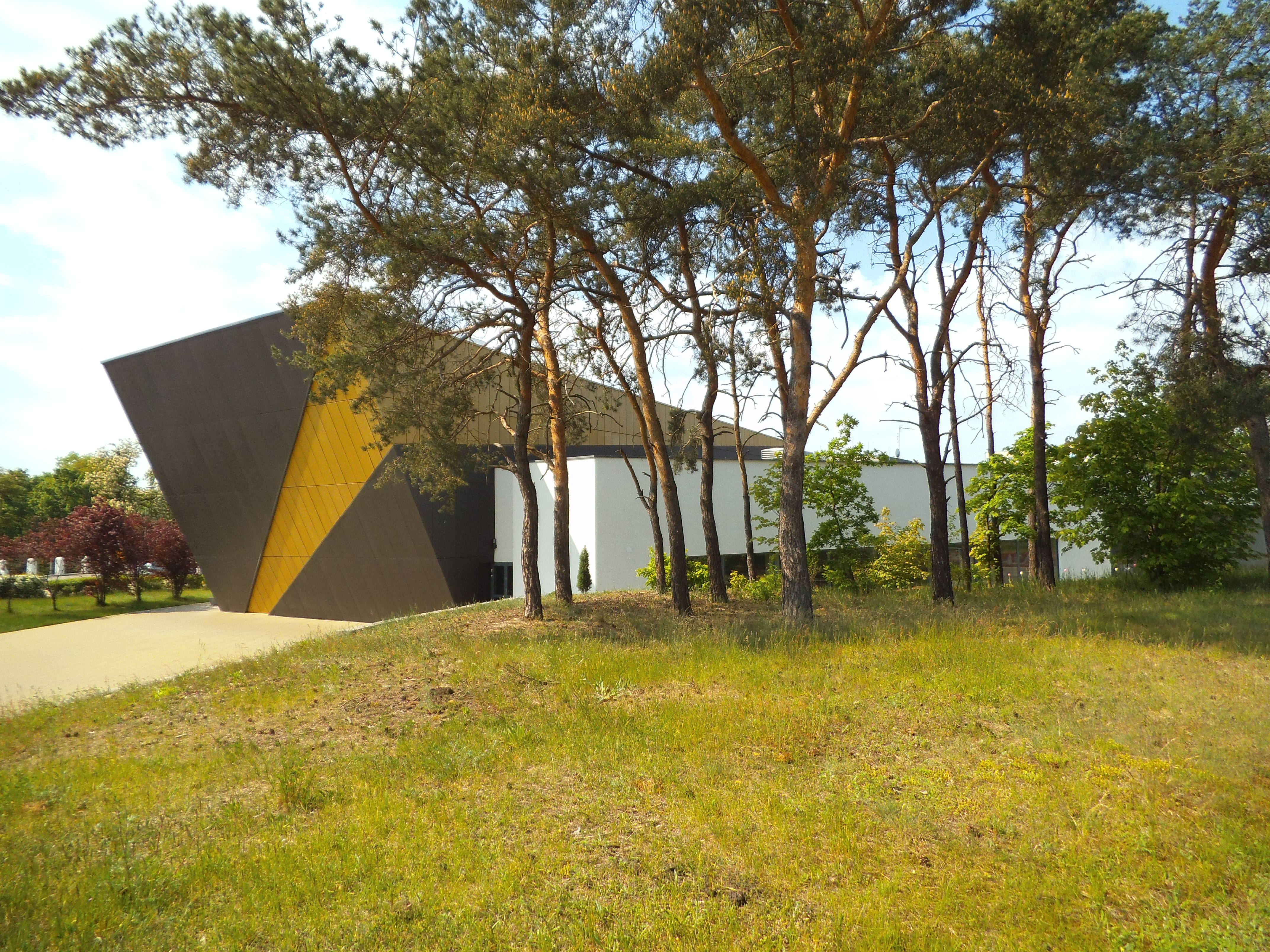 Od Nowa Toruń5